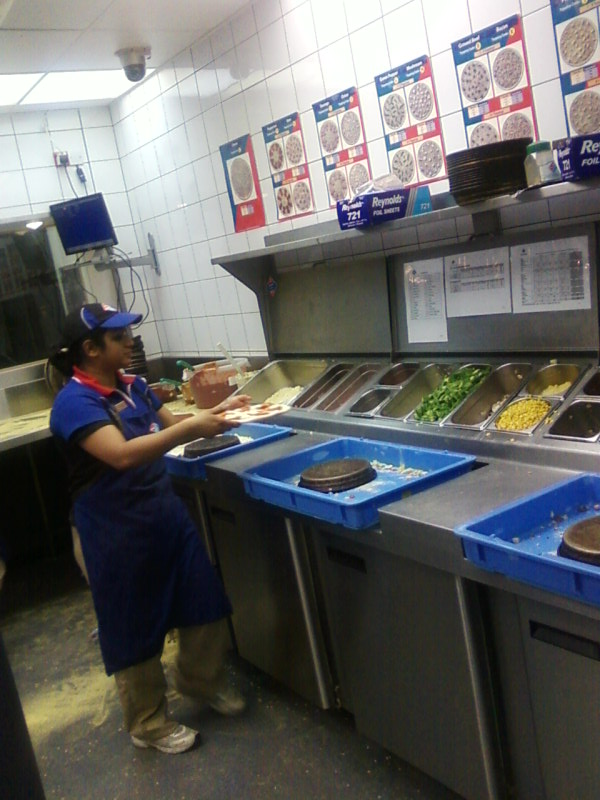 Специальный «стол-конвеер» для приготовления пиццы.